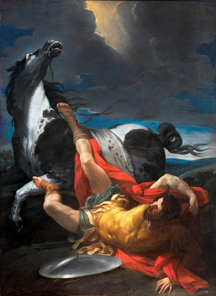 La obra representa el momento en que el apóstol San Pablo, llamado anteriormente Saulo, cayó de su caballo cuando iba de camino hacia Damasco para perseguir a los cristianos y se convirtió a esta religión.